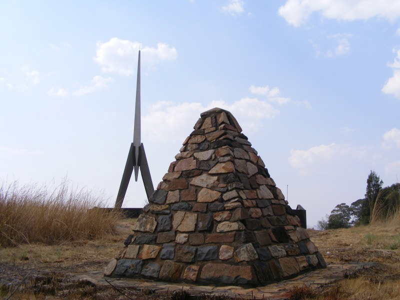 Battle of Berg en Dal